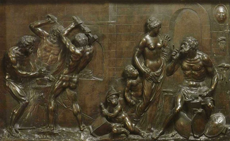 Георг Доннер. Венера в кузнице Вулкана. 1735.jpg: рельєф Венера в кузні бога Вулкана.